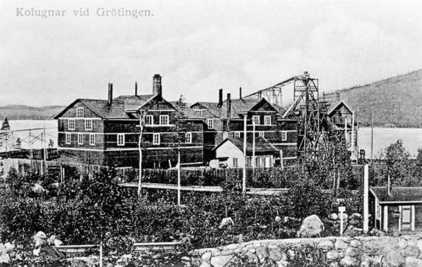 AB Carbo's coal ovens in Grötingen village, Bräcke municipality, Jämtland, Sweden.